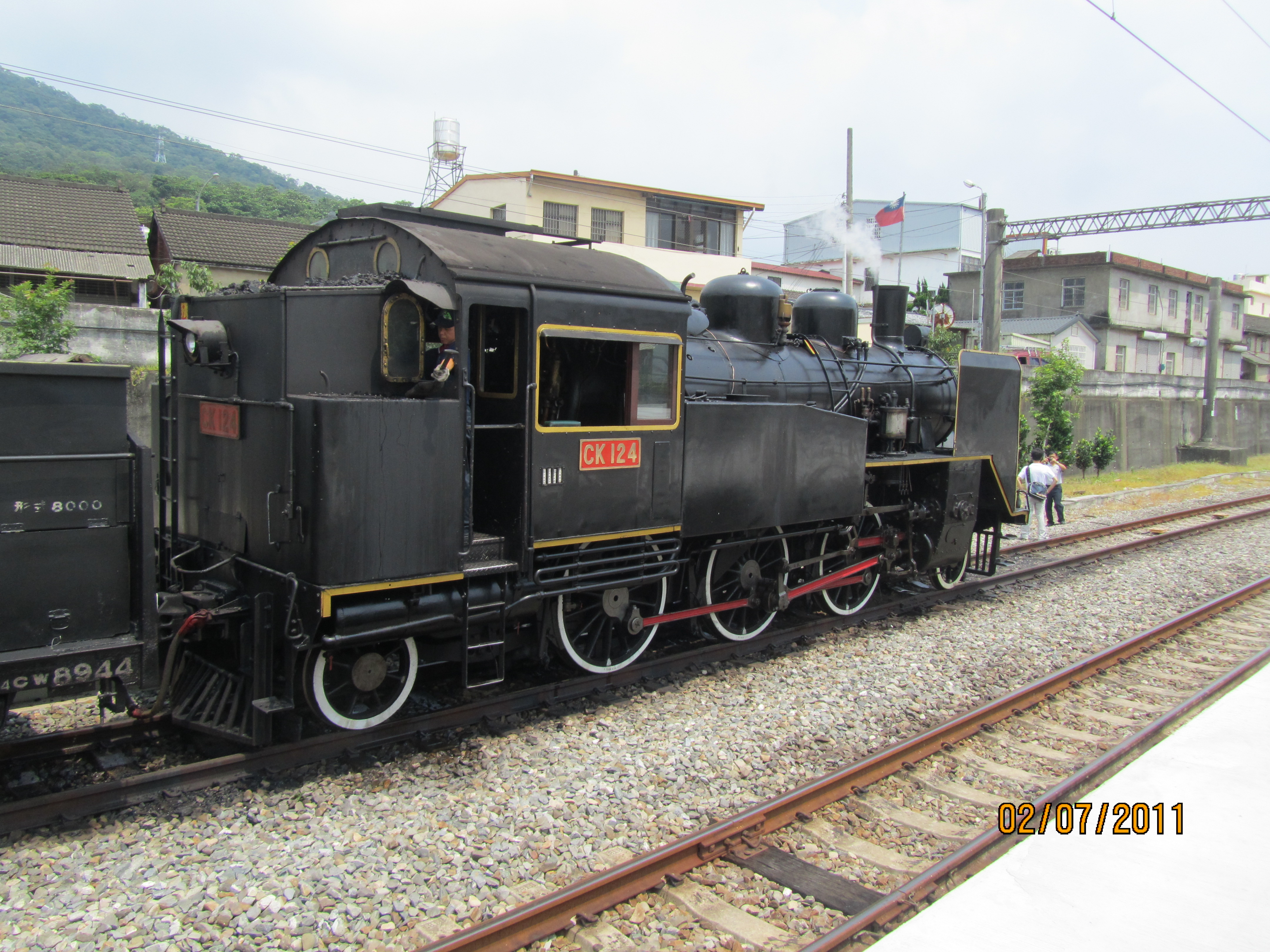 三義站內的CK124，搭配暑假舊山線列車活動的牽引機；自三義站第二月台拍攝，右側為勝興、台中方向。2011年7月2日